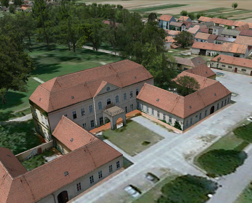 pohled na 3D model vesnice Dukovany